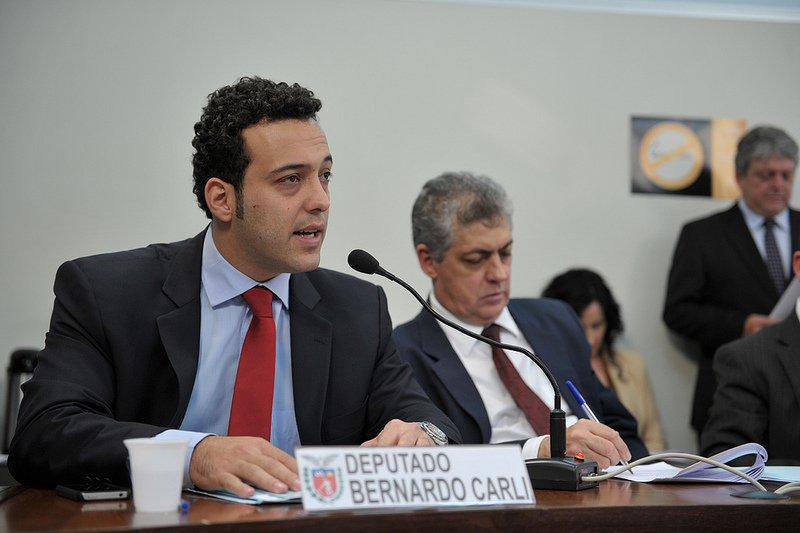 Deputado Estadual Bernardo Ribas Carli em Sessão da CCJ - Maio de 2013